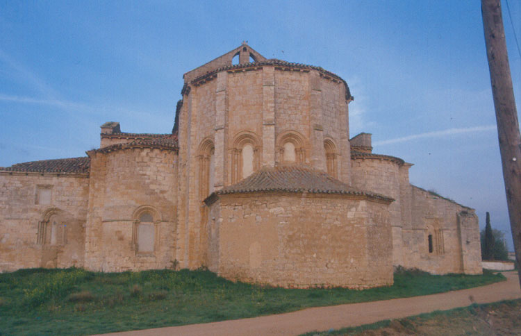 Monasterio de Santa María de Palazuelos - Cabezón de Pisuerga (Valladolid) - Diapositiva 48 x 48 Color